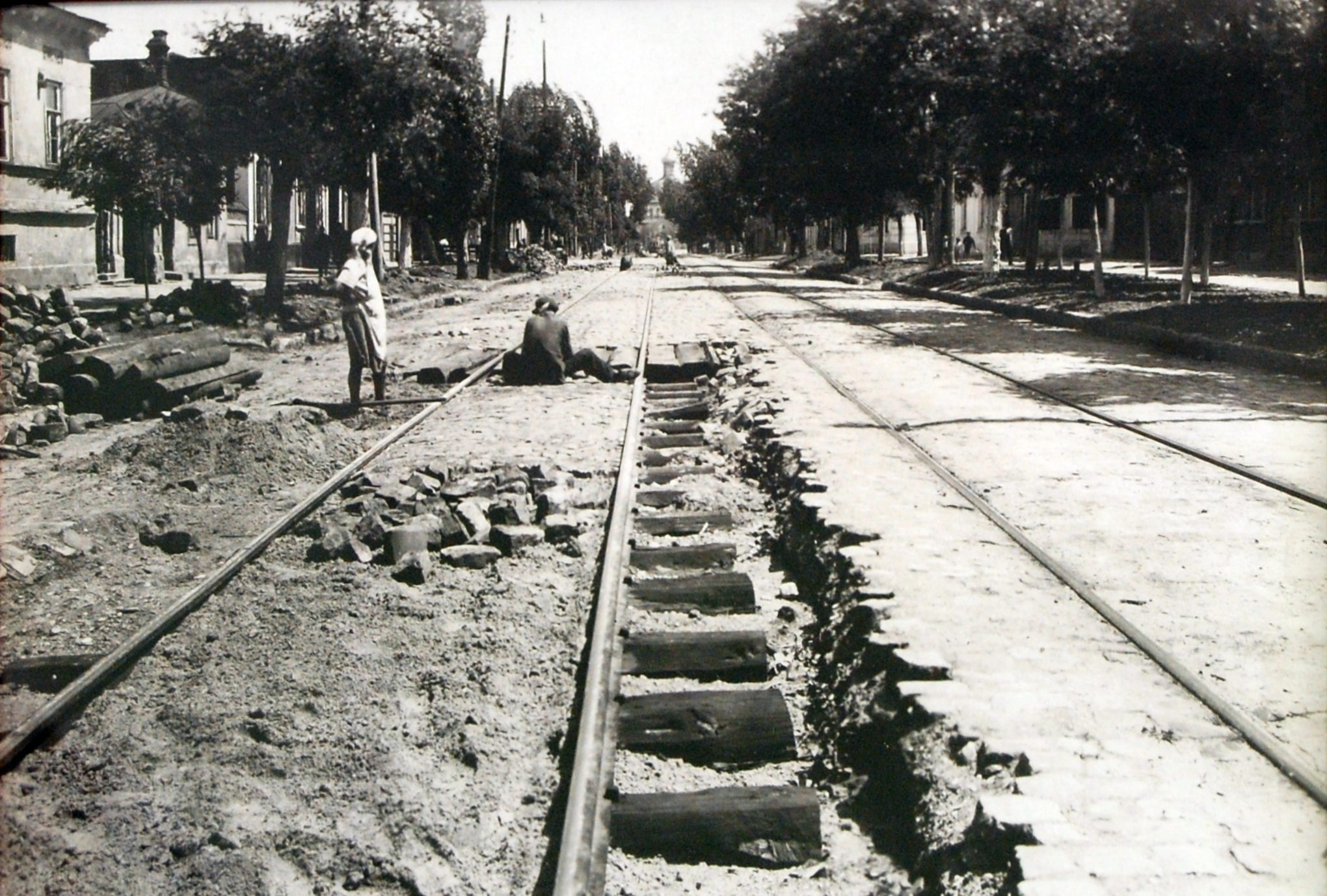 Строительство второй нитки трамвайной линии в Таганроге по ул. Фрунзе, на Соборную площадь.